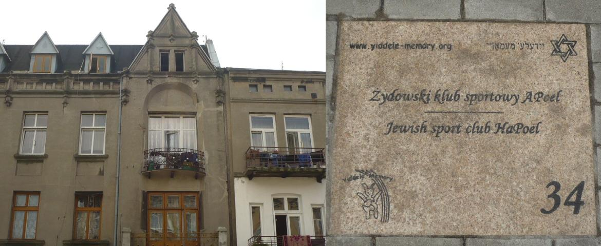 Radomsko. Otwarte Muzeum Żydowskie 34